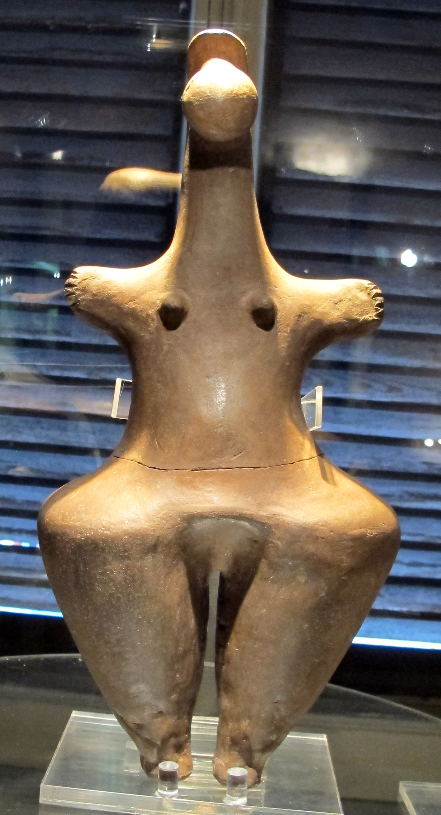 Iran sett.le, gilan, figura femm.le in terracotta, 1200-100 ac. ca.